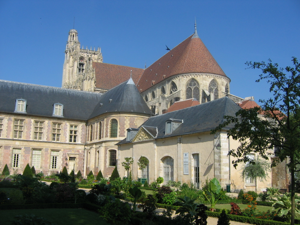 Cathédrale de Sens, Yonne, France